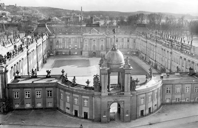 Potsdam.- Stadtschloß mit Fortunaportal vom Turm der Nikolaikirche